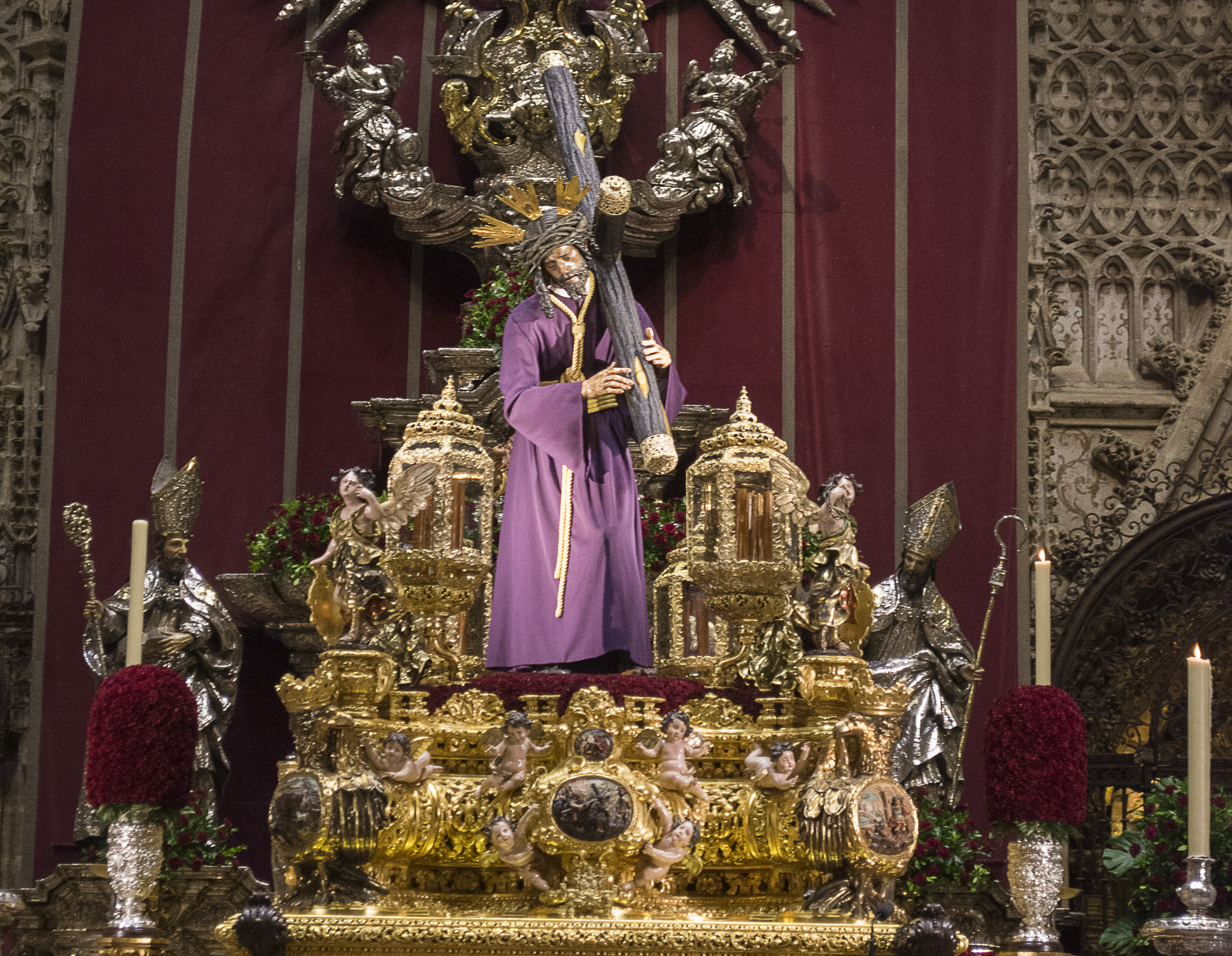 Imagen y paso de Jesús del Gran Poder, en la catedral de Sevilla en 2016.